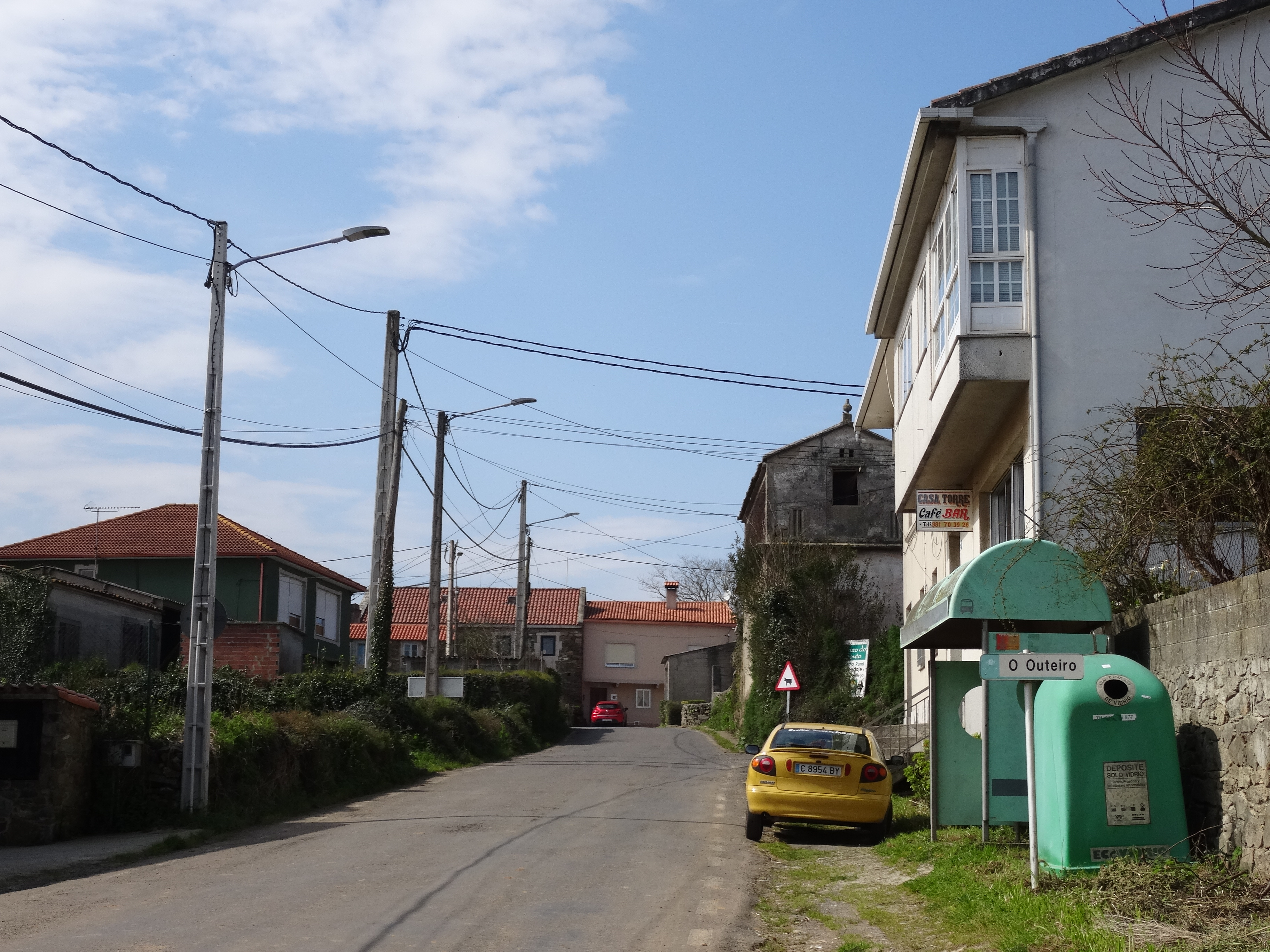 Lugar do Outeiro na parroquia de Sísamo, Carballo.